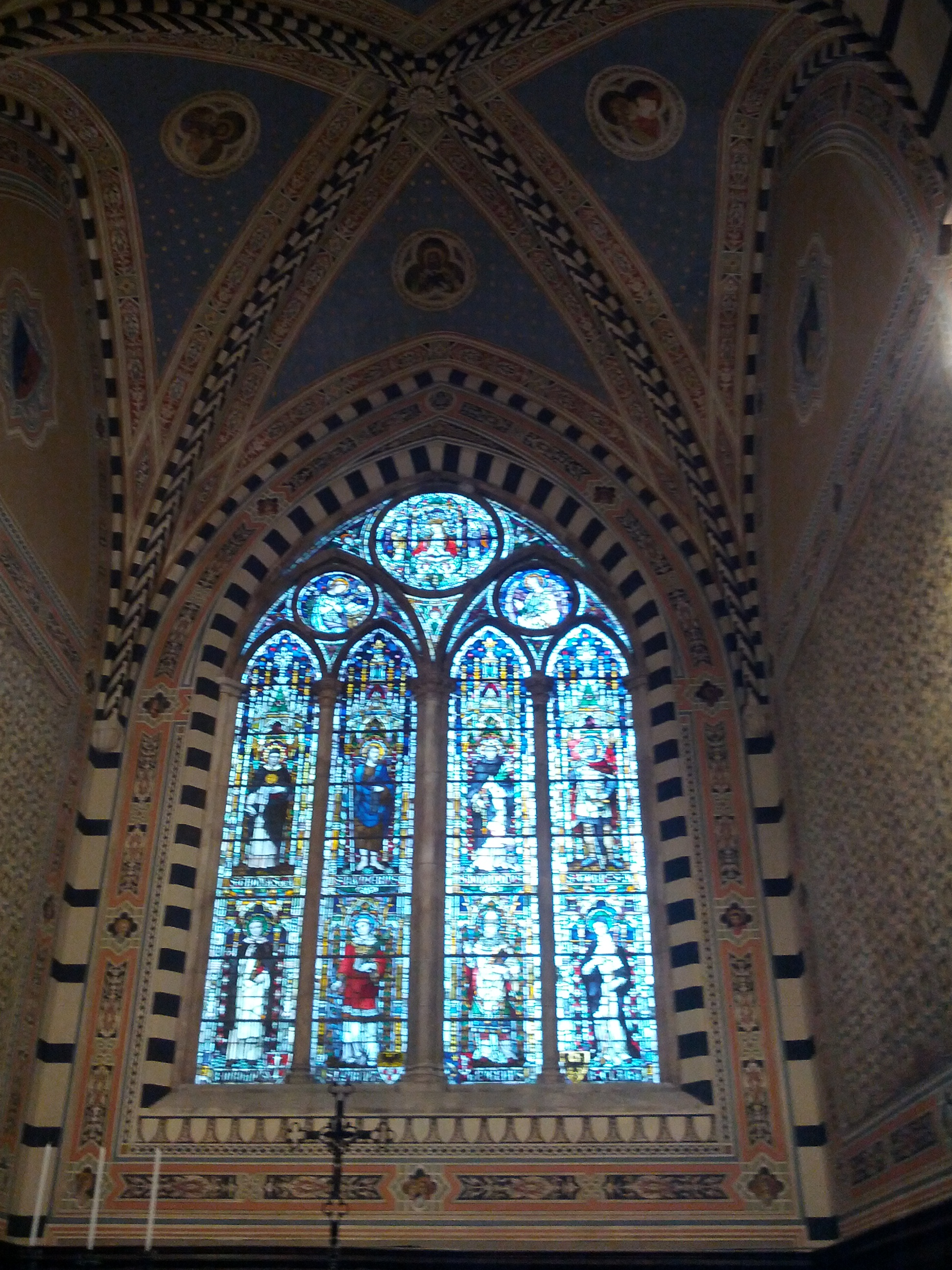 Pisa, s. caterina, int.